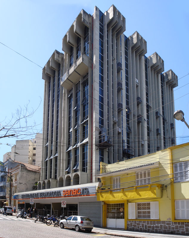 Edifício da Faculdade de Tecnologia do SENAC-RS, projetado por Leonora de Alencastro e inaugurado em 1979. Localiza-se no Centro Histórico de Porto Alegre